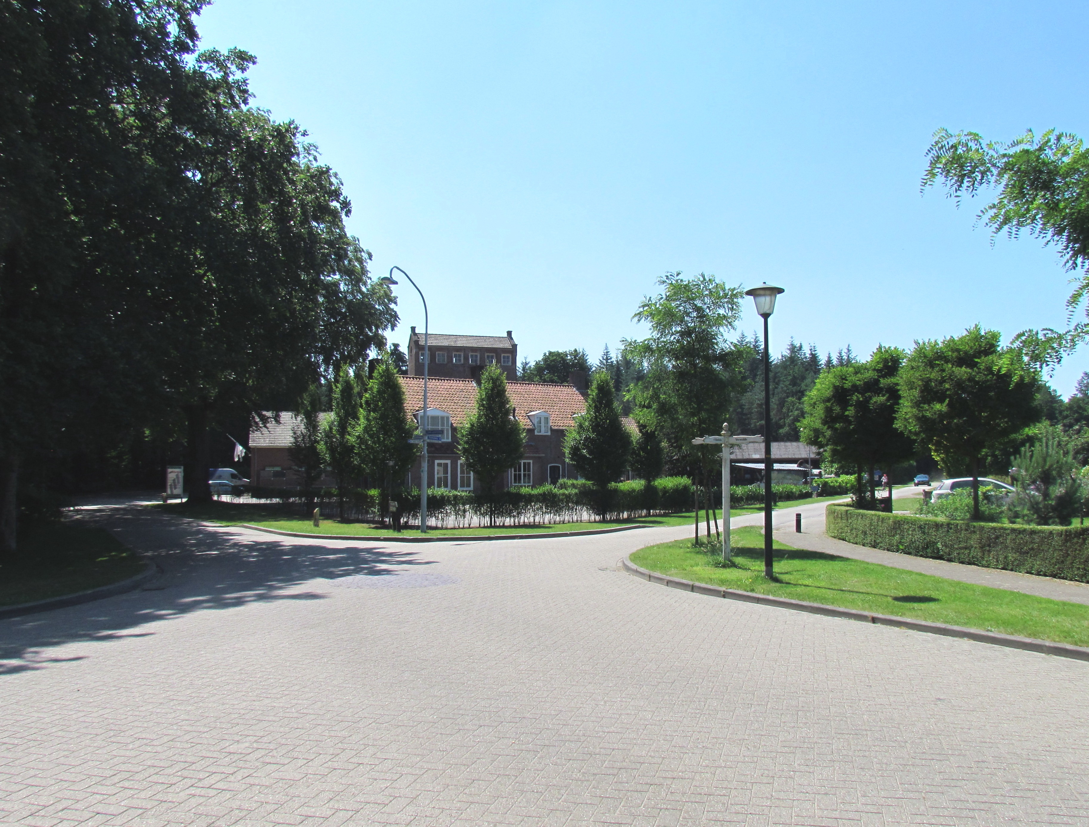 Kruispunt in Exel (gemeente Lochem, NL)